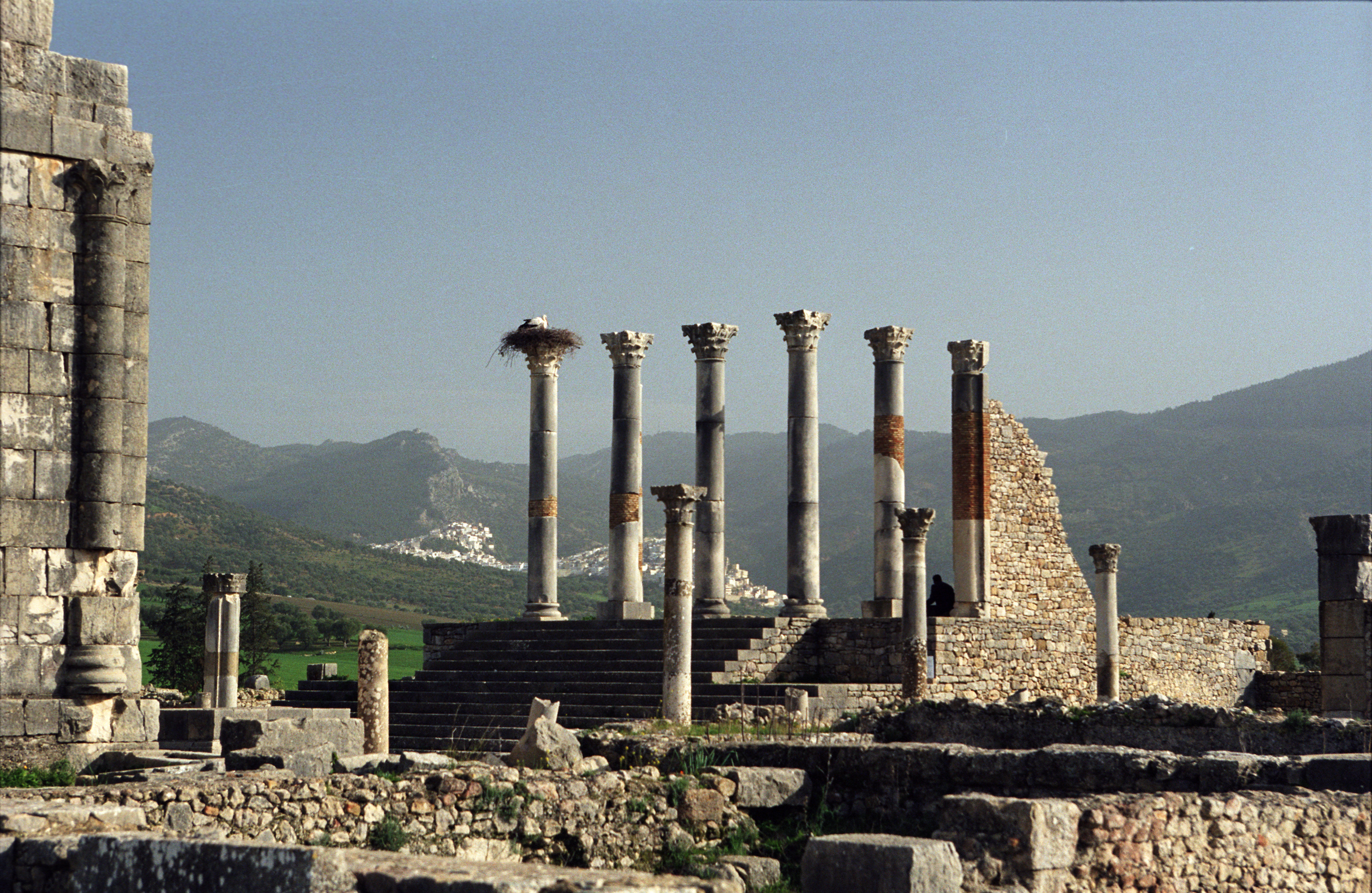 Volubilis, Morocco